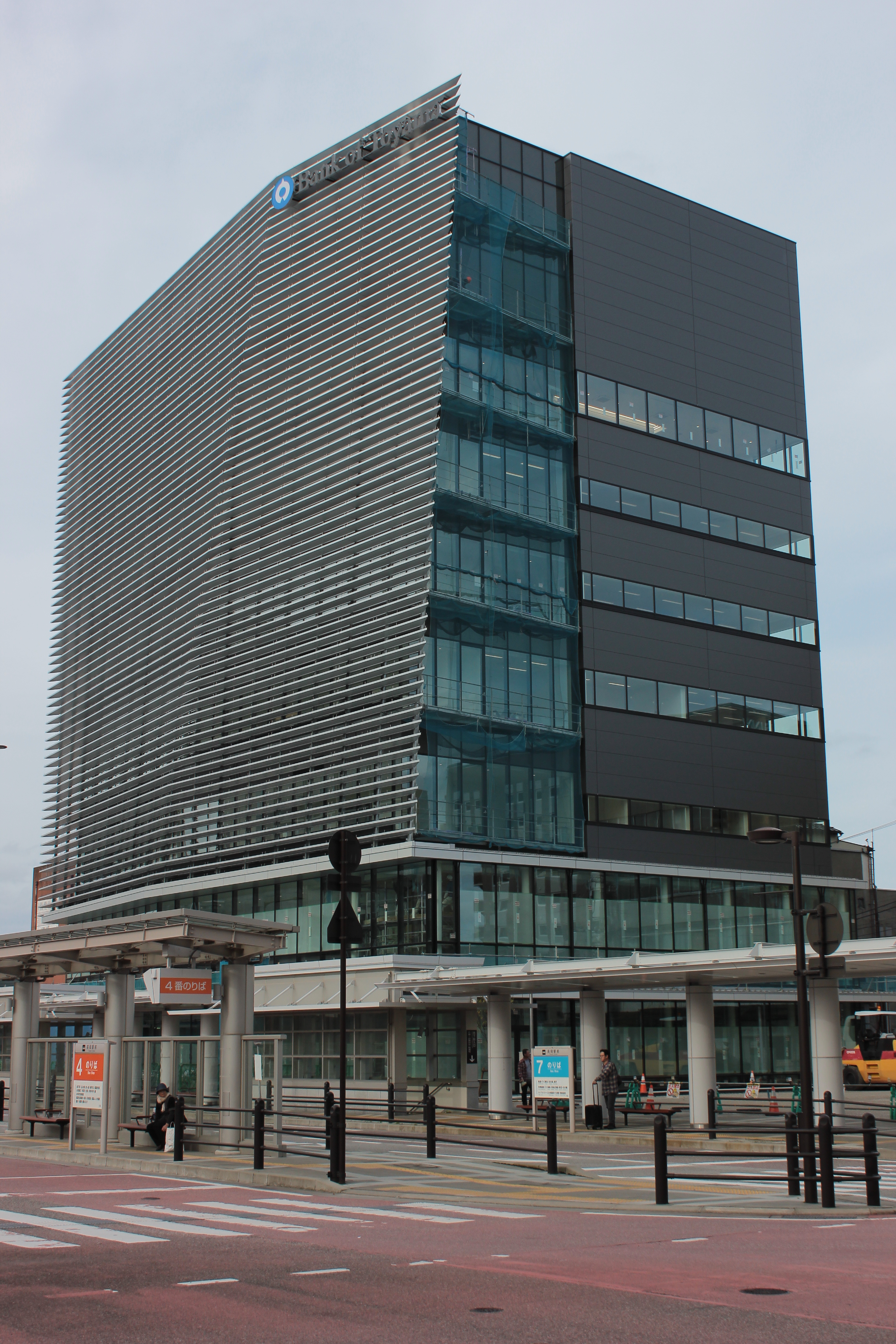 富山県高岡市にある富山銀行本店、2019年に高岡駅前に移転（撮影時は建設中）。 Canon EOS Kiss X5